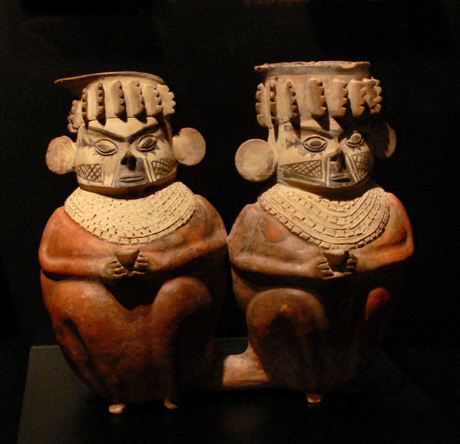 Exhibit at the Musée du quai Branly, Paris, France